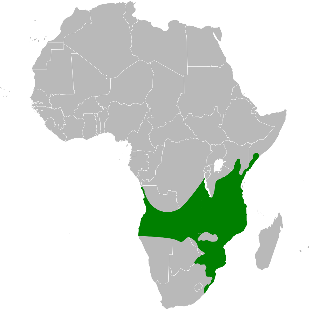 Chlorocichla flaviventris distribution map, based on